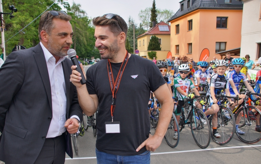 2019 17ott ob prolog gera 01503